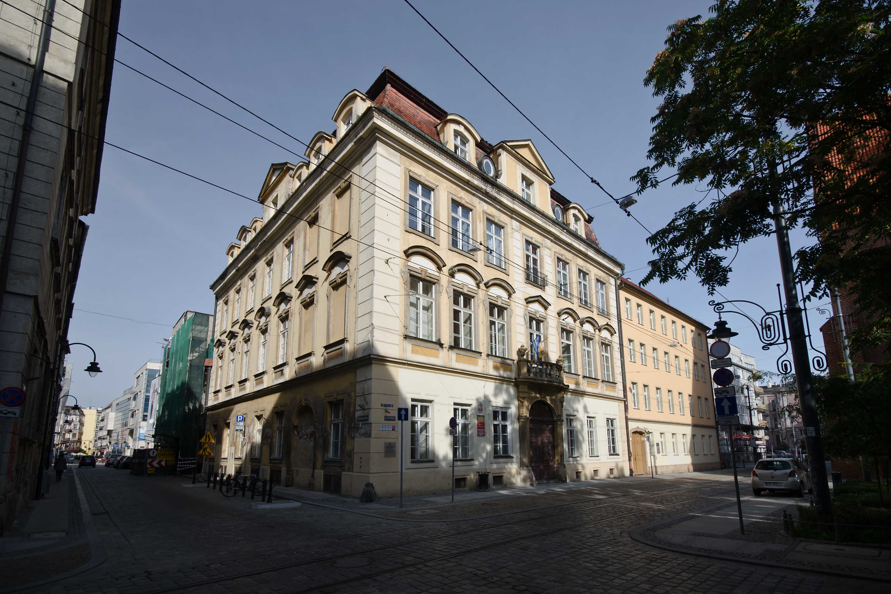 Pałac Hornesów, ob. budynek Uniwer.Wr. Szewska 48, Miasto Wrocław - Stare Miasto